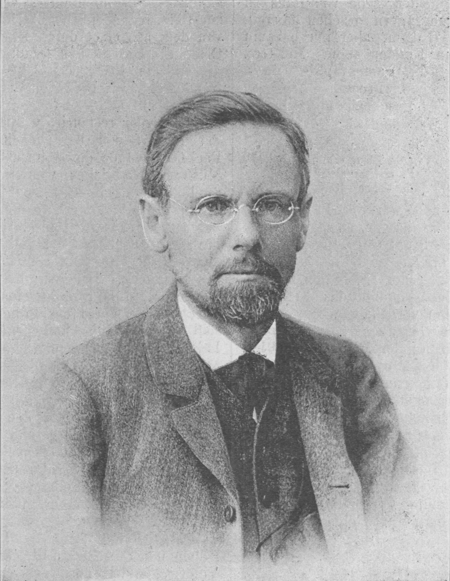 P. K. Rosegger (1843-1918). Nach einer Photographie von Leopold Bude, Hof-Photograph in Graz